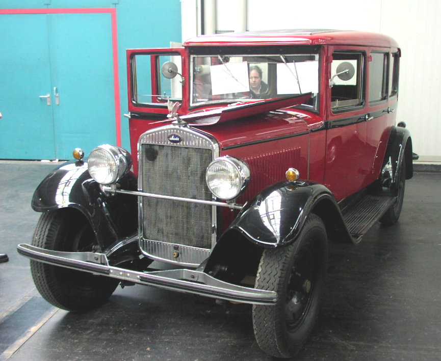 Škoda 430 Saloon (1930)